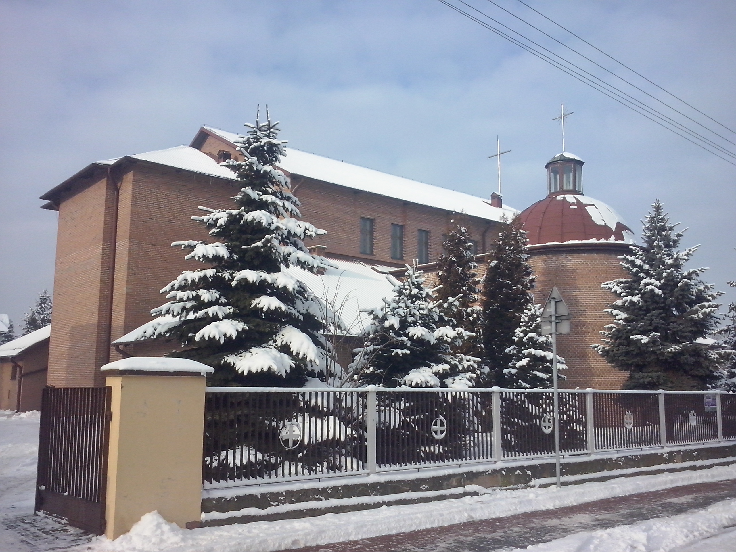 Płochocin (gm. Ożarów Mazowiecki, pow. warszawski zachodni, woj. mazowieckie) - kościół Św. Wojciecha Biskupa i Męczennika